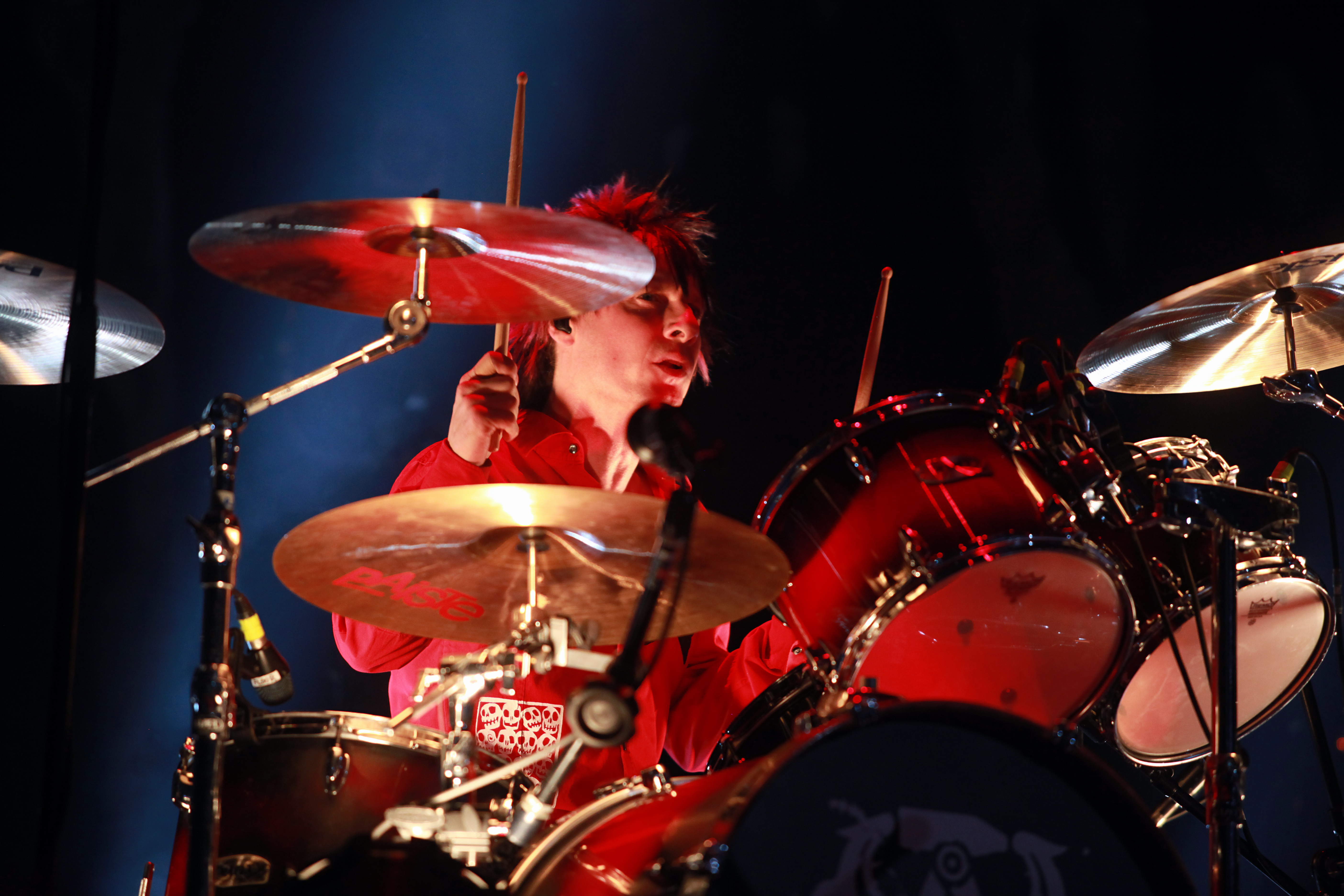 Vom Ritchie, bürgerlich Stephen George Ritchie, von den Toten Hosen am 15. Dezember 2012 in der SAP Arena in Mannheim.